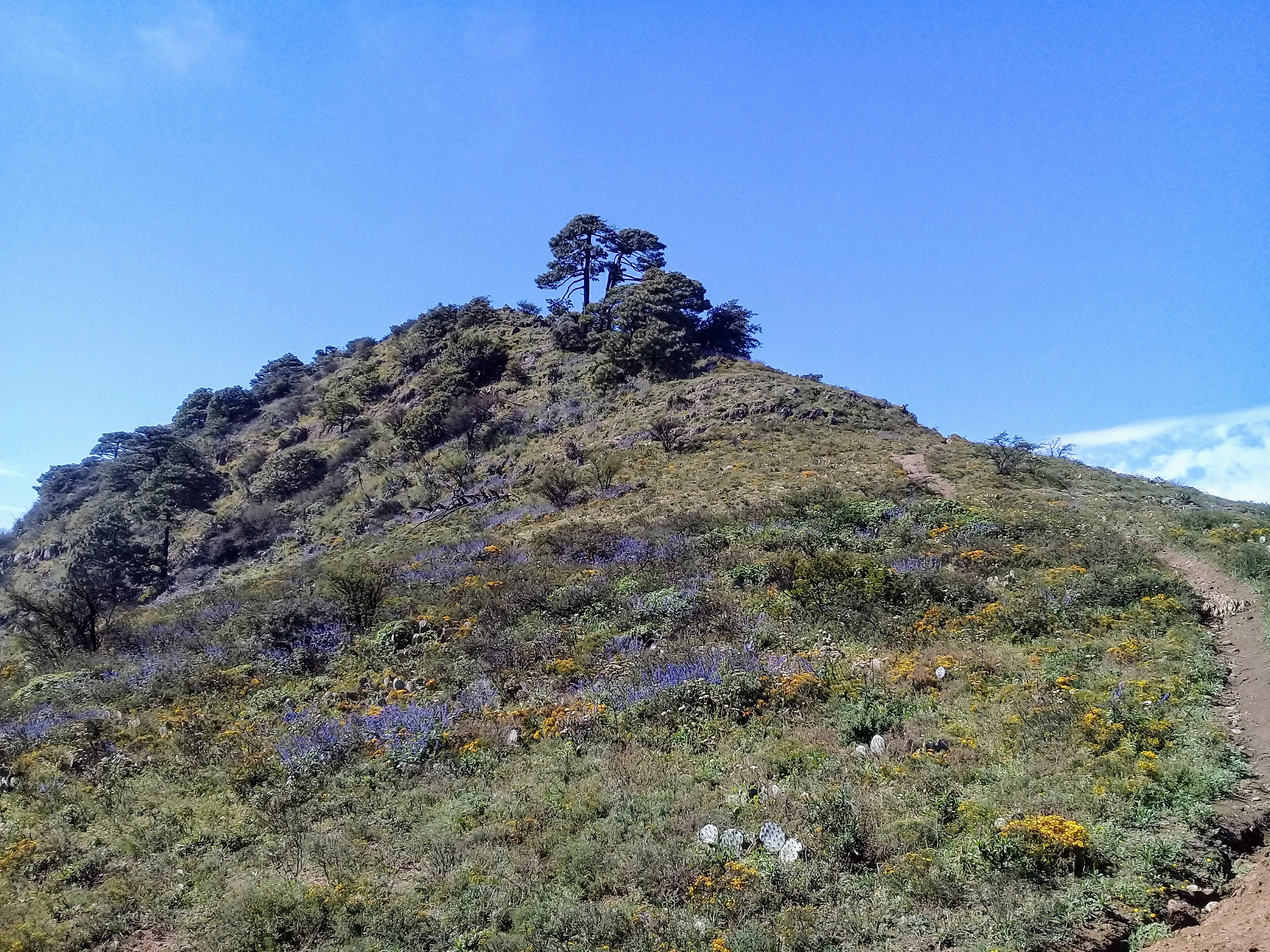 Cumbre la Mota Chica